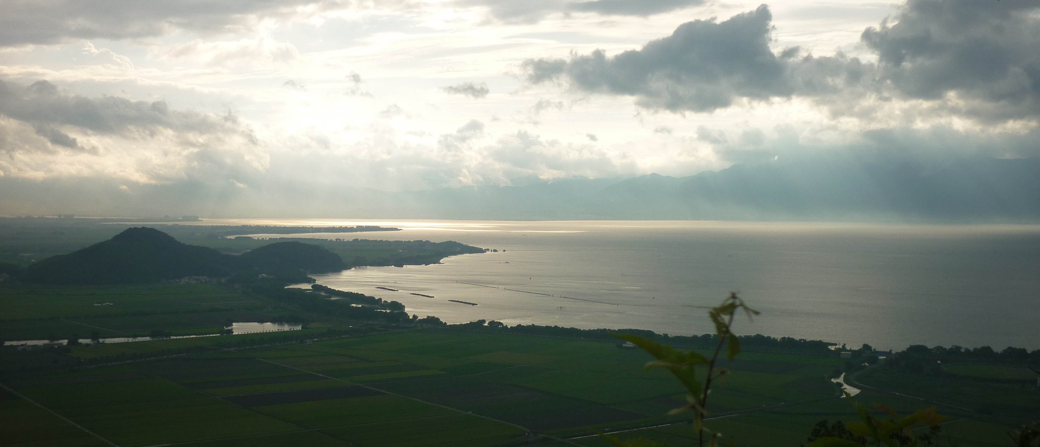 西の丸からの眺望